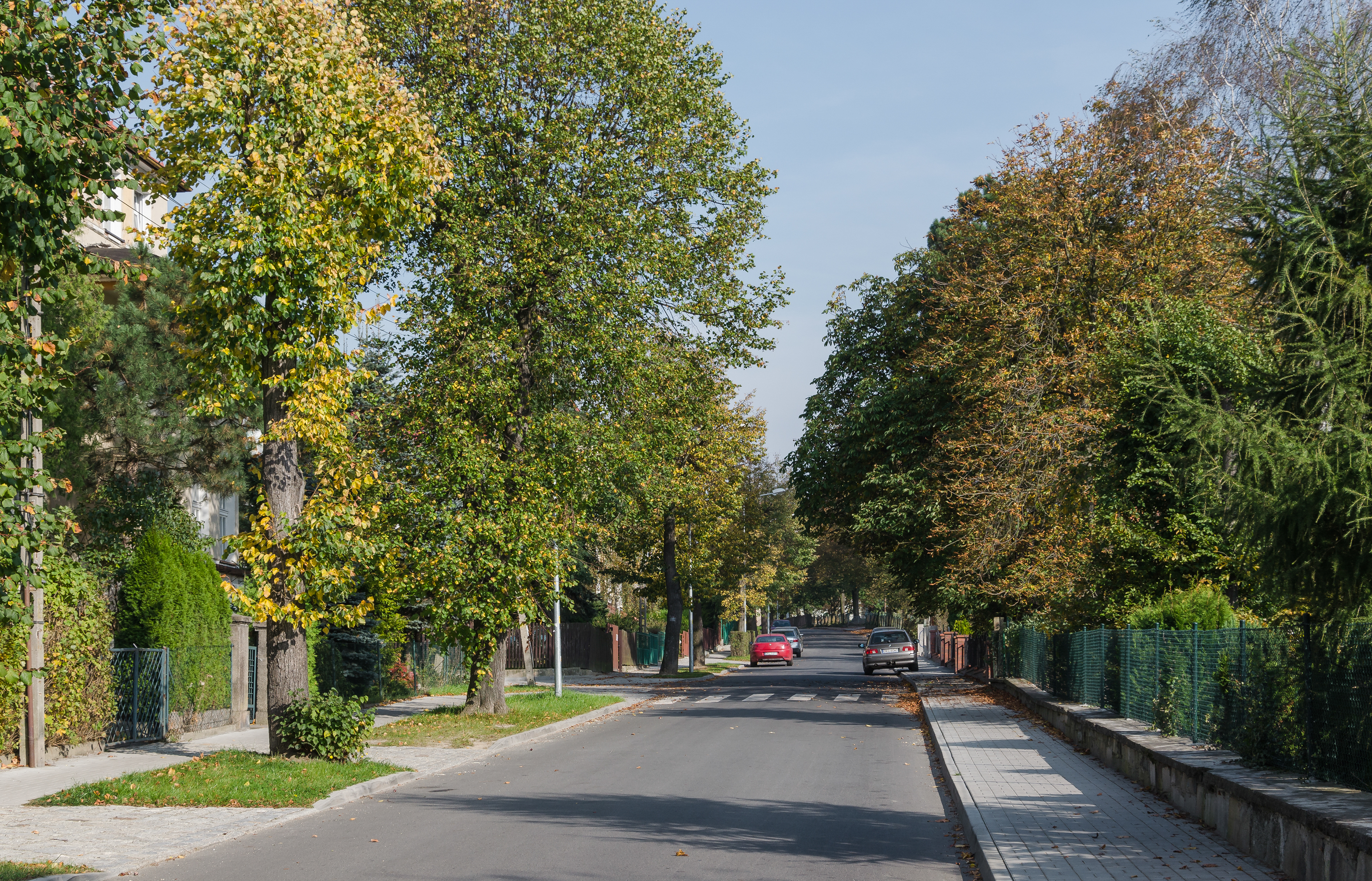 Kłodzko, ul. Walecznych